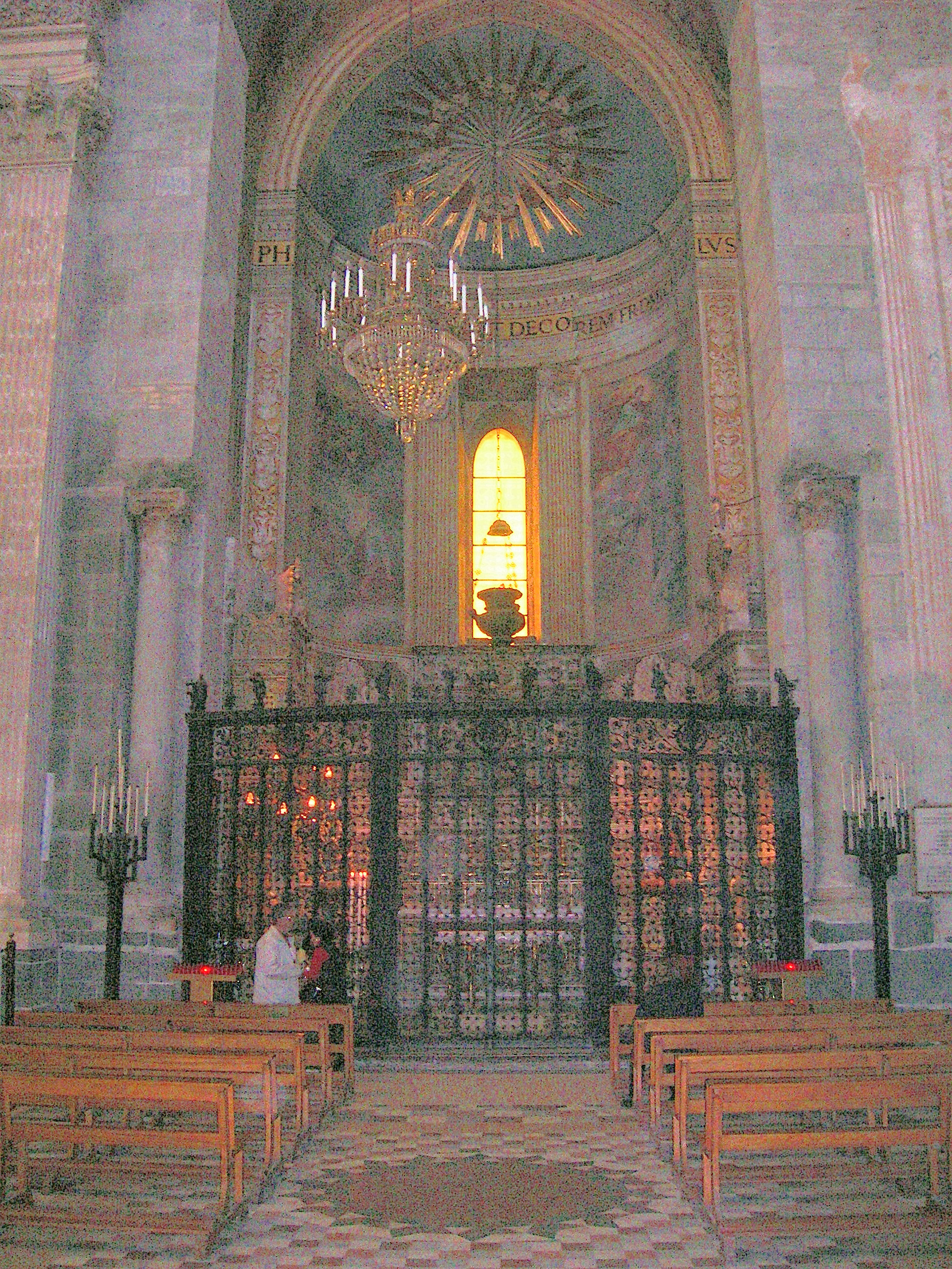 Cappella di sant'Agata, Cattedrale di Catania